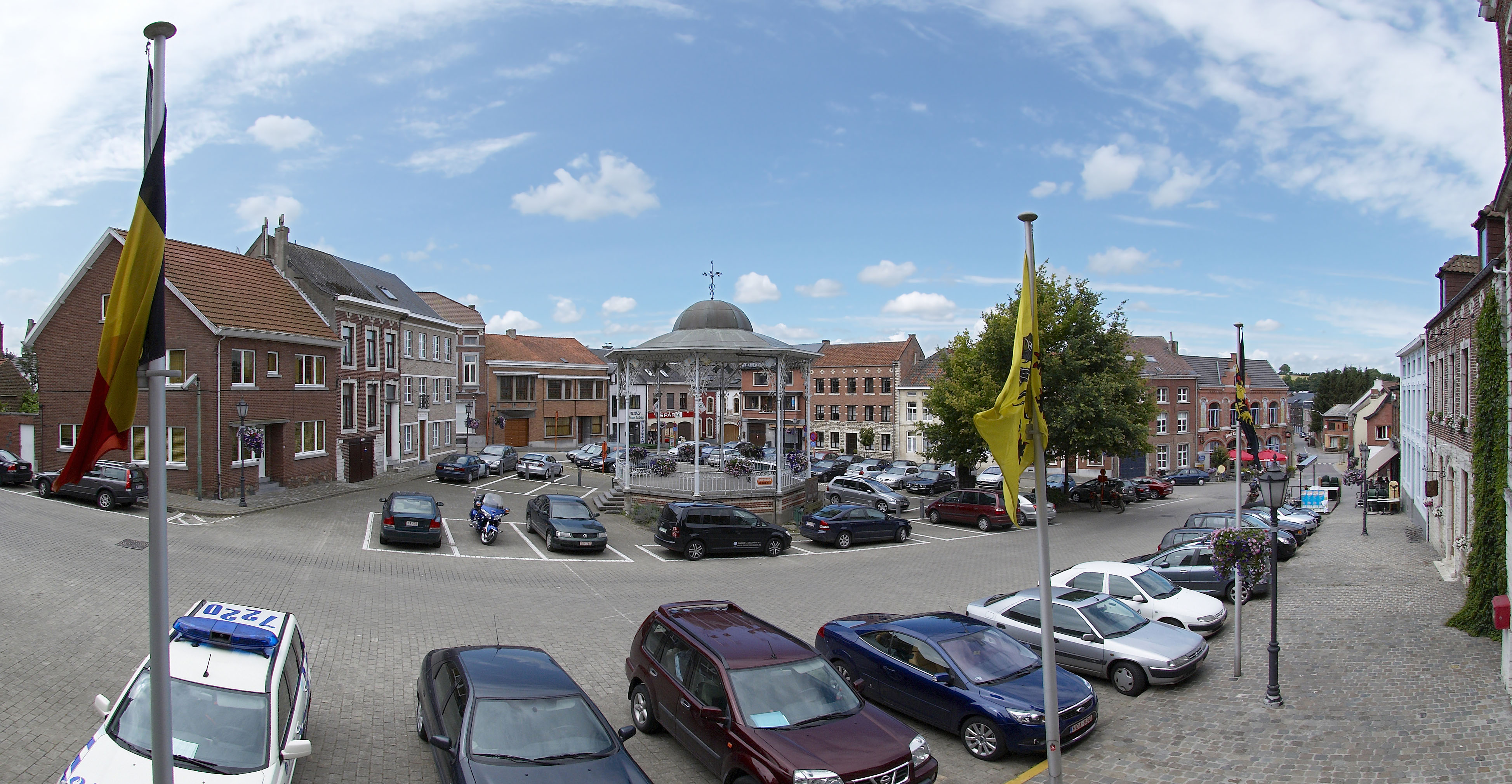 Gemeenteplein in Hoegaarden, België